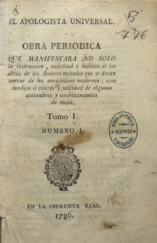 El Apologista universal, obra periódica, editada en Madrid en la Imprenta Real bajo la dirección del agustino Pedro Centeno, n.º 1, 1786. Hemeroteca Digital Hispánica, Biblioteca Nacional de España.